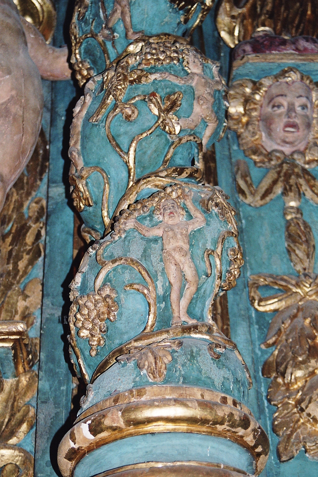 Fara Novarese (NO), Oratorio di Santa Marta: particolare dell'altare ligneo.